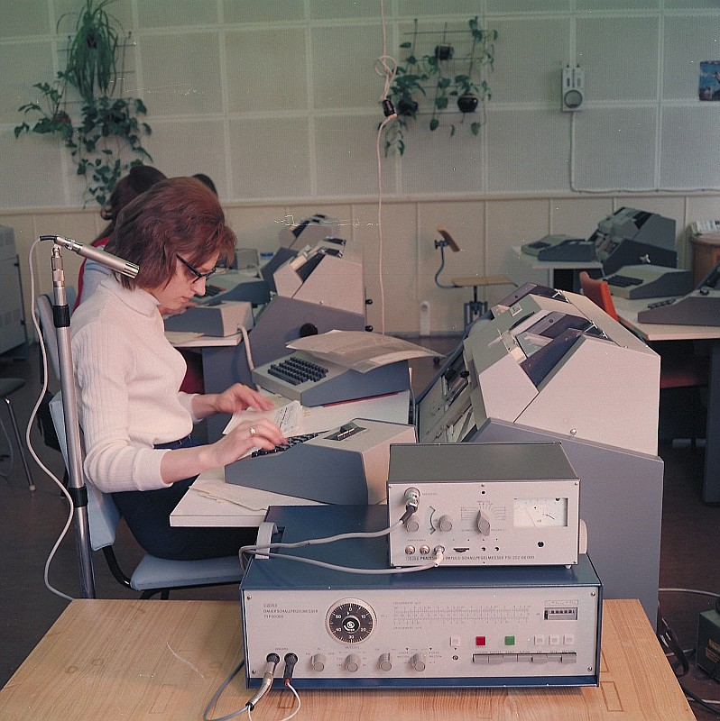 Original image description from the Deutsche FotothekFacharbeiter für Schreibtechnik